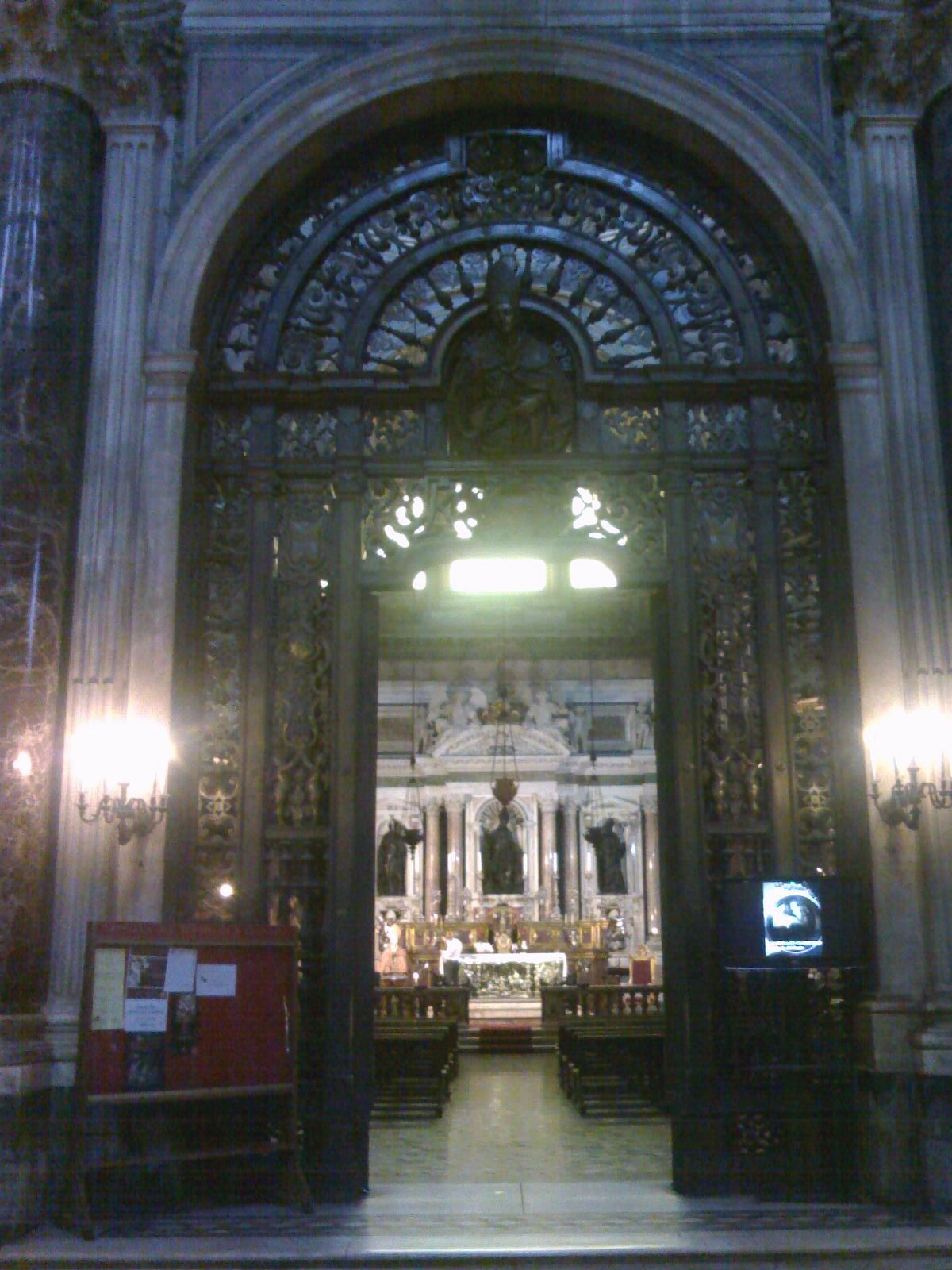 Cancello di Cosimo Fanzago - Cappella del tesoro di San Gennaro (duomo di Napoli)